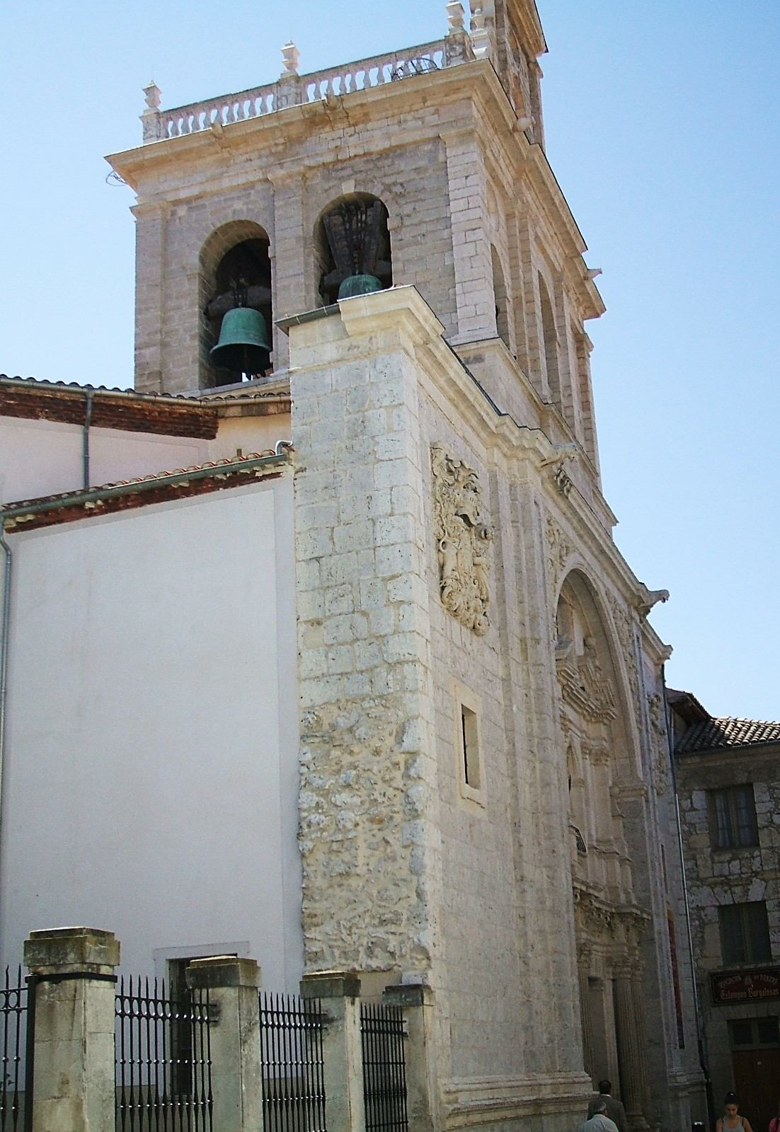 Iglesia barroca de San Lorenzo (s-XVII), Burgos, Castilla y León, España/Spain